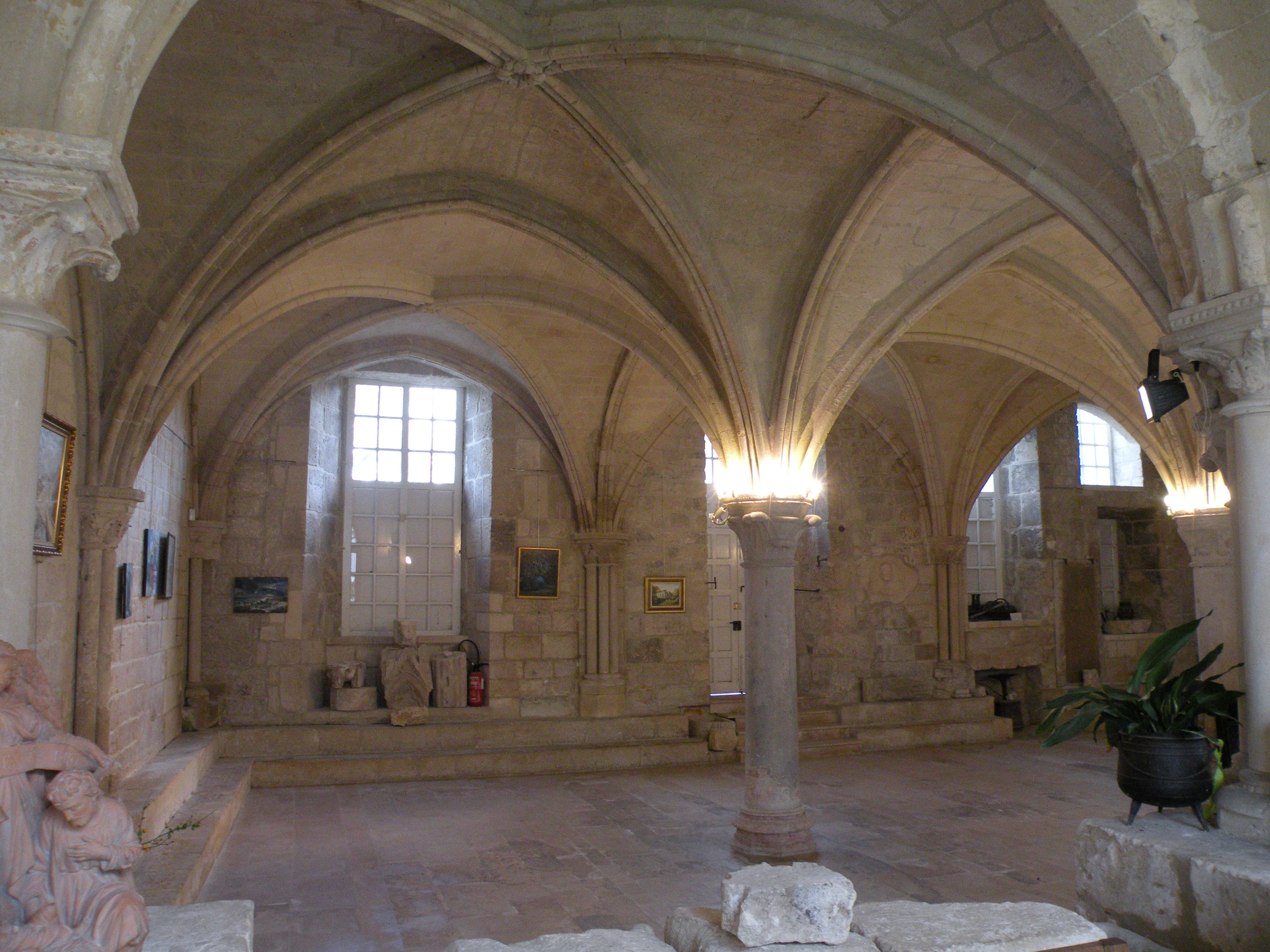 Salle capitulaire.